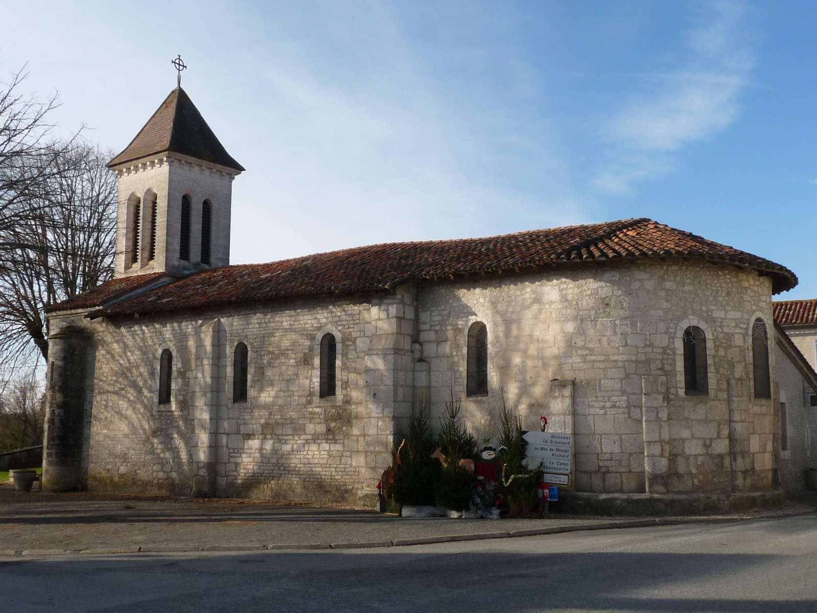 église de Petit-Bersac, Dordogne, France